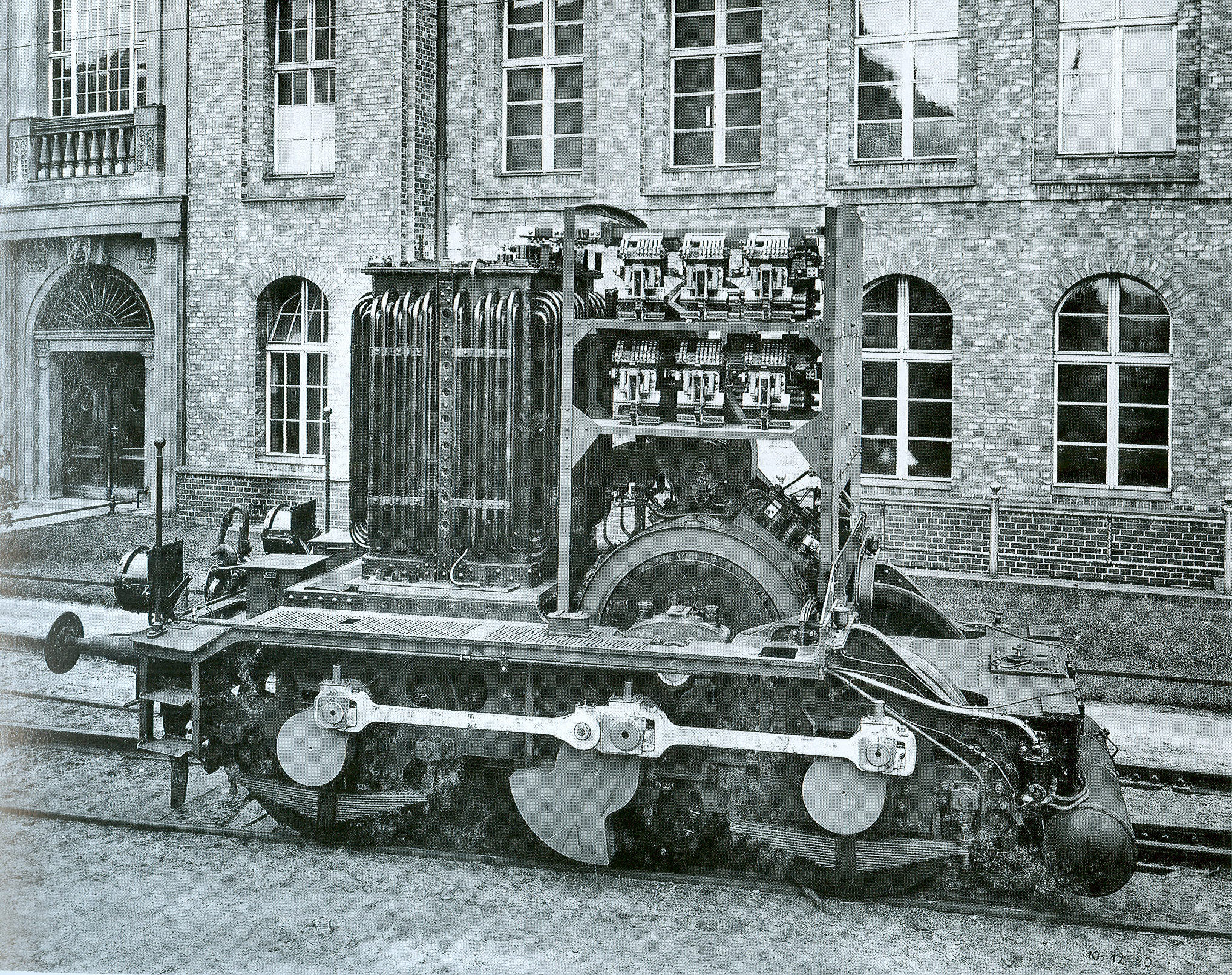 Werkfoto von LHW von dem Enddrehgestell der EG 538